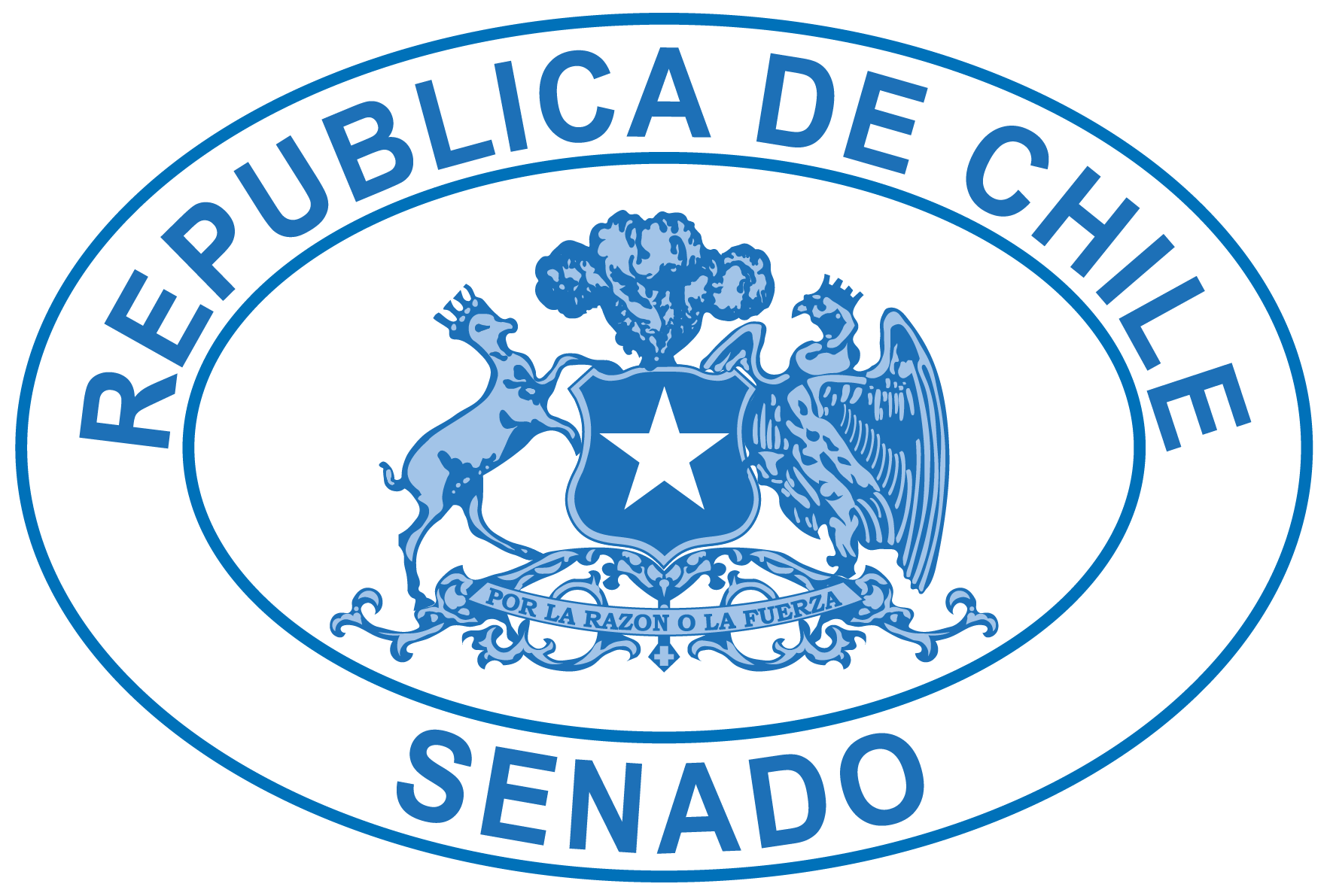 Emblema del Senado de la República de Chile.